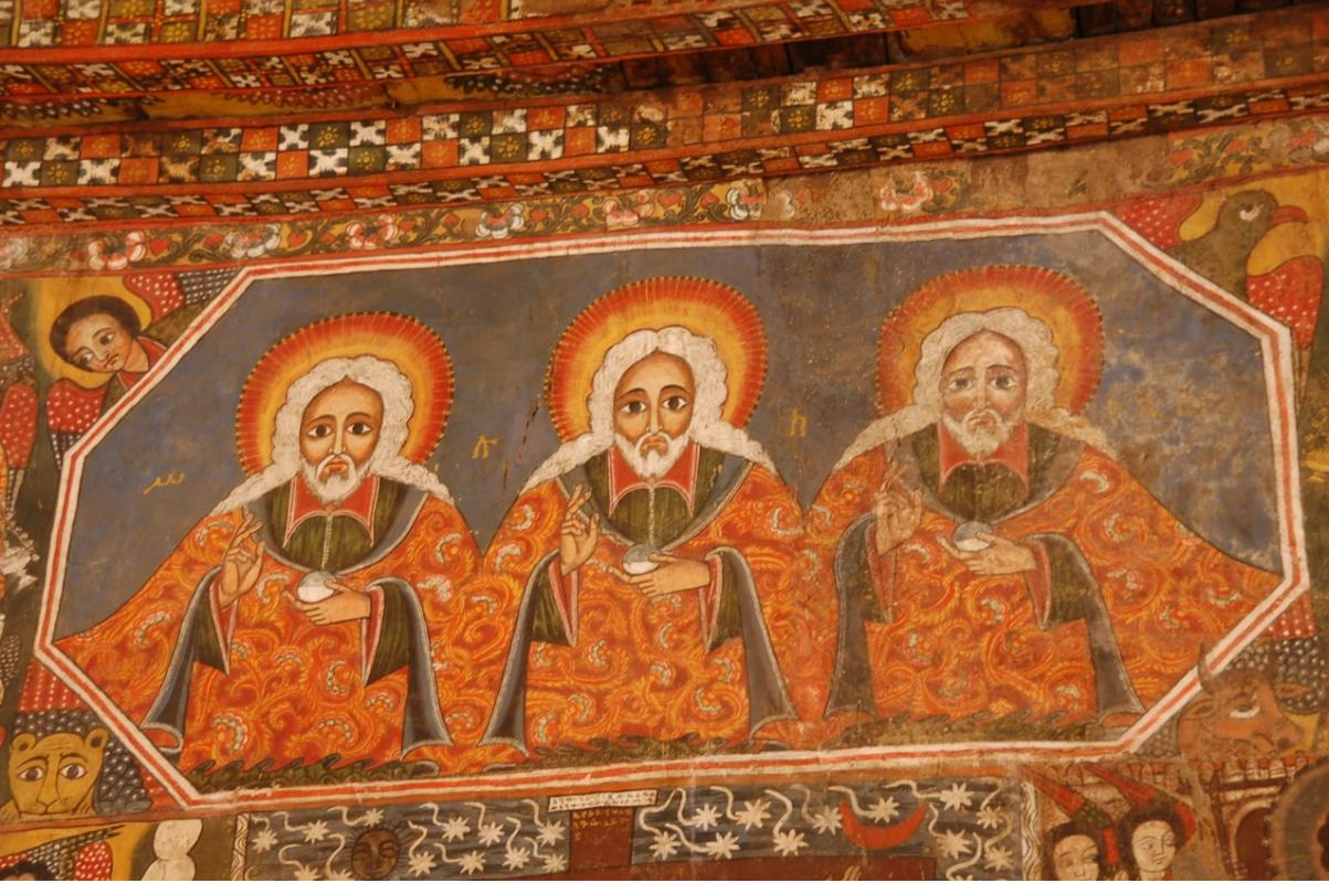 Intérieur de l'église Debré Berhan Sélassié, détail: La Sainte Trinité